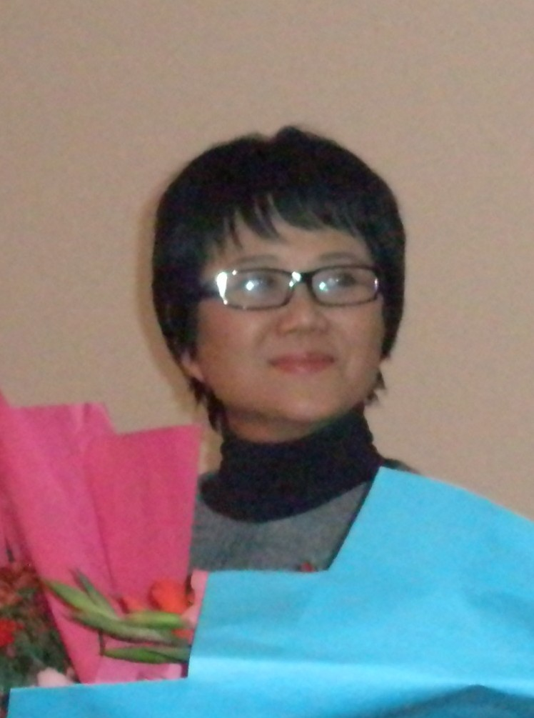 中国导演胡玫，摄于电影孔子南京观众见面会